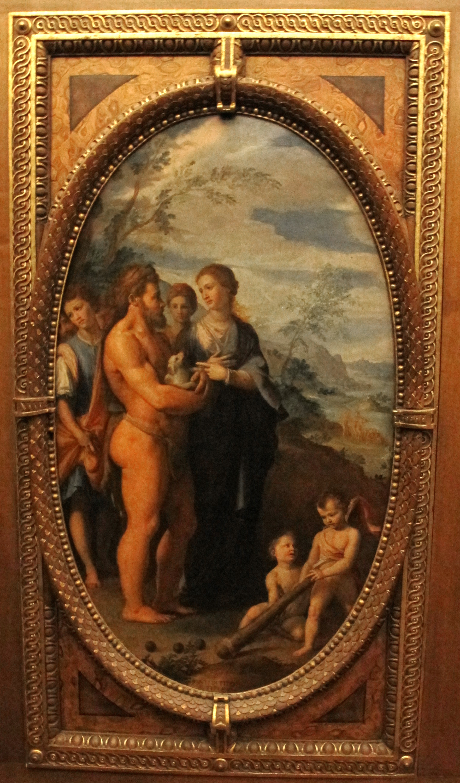 Hercules and Iolelabel QS:Len,"Hercules and Iole" label QS:Lit,"ercole e iole"